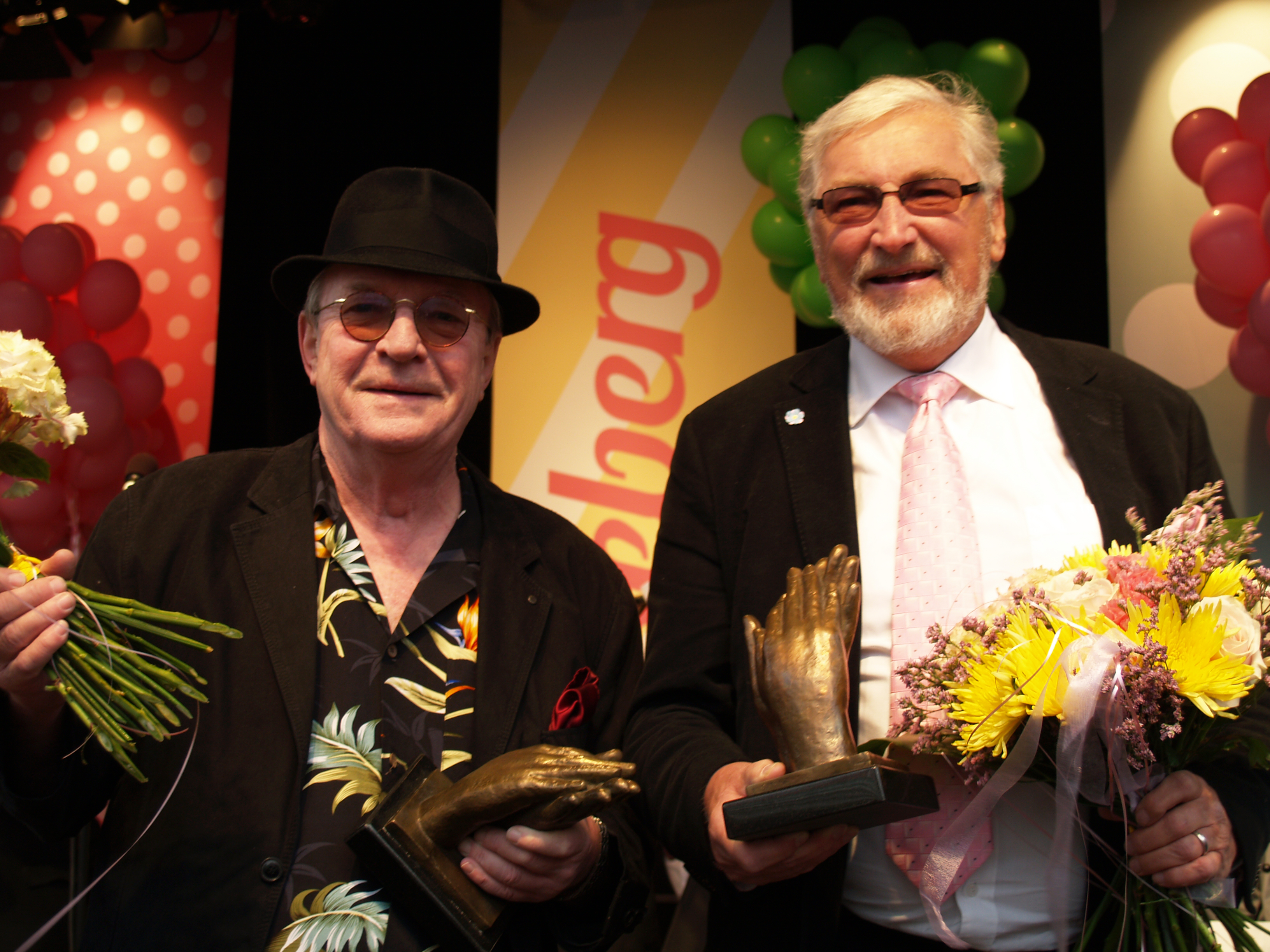 Brasse Brännström och Magnus Härenstam efter att ha fått Lisebergsapplåden 2013.